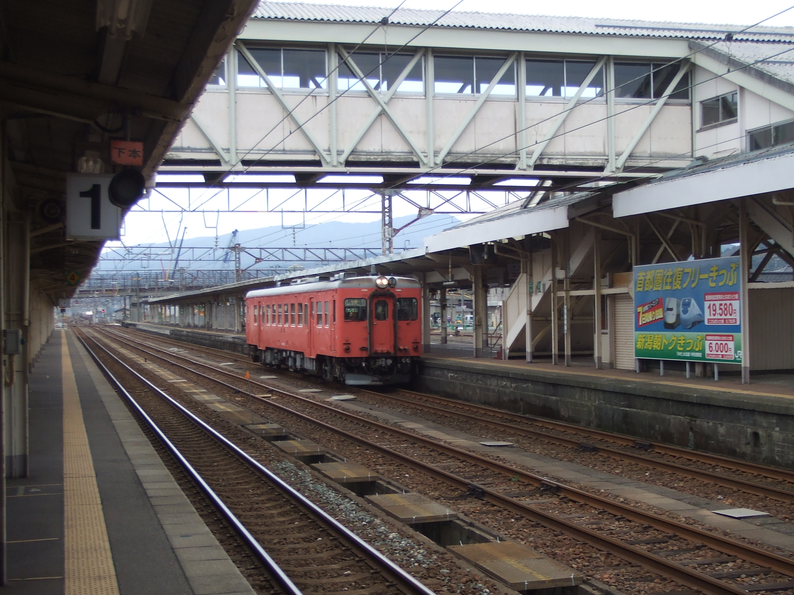 糸魚川駅 駅構内